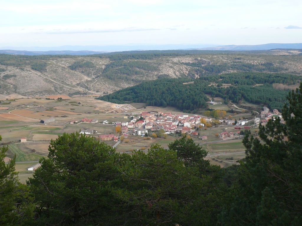 Griegos desde el alto de la Muela de San Juan